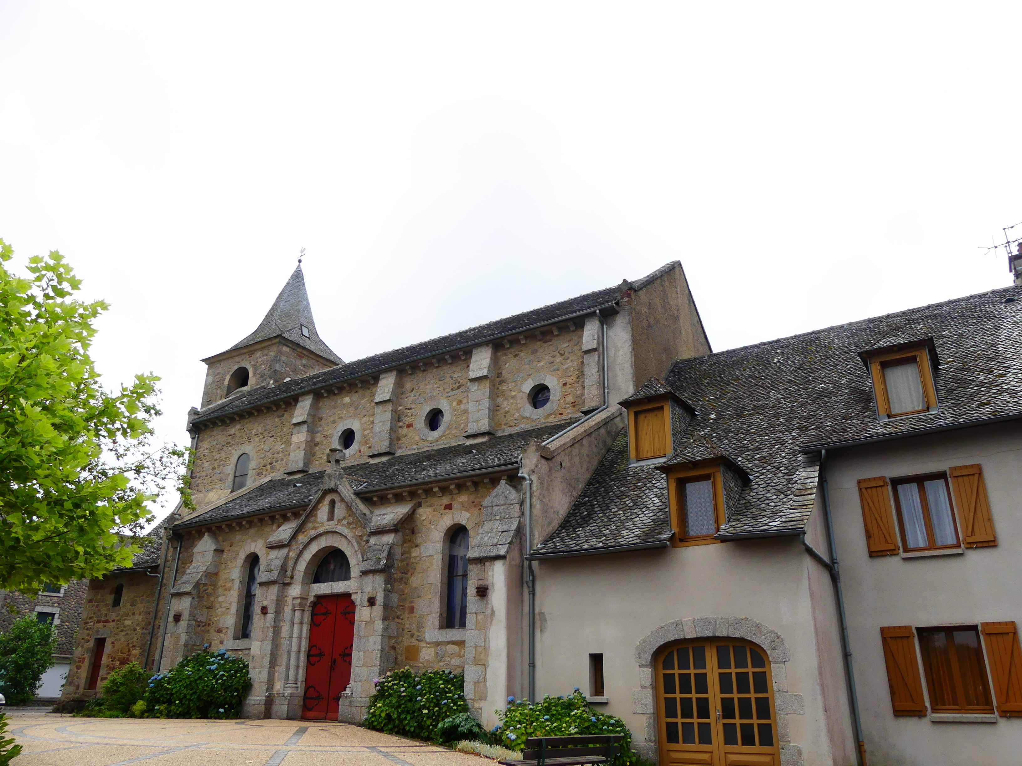 L'église de Campuac, Aveyron, France.